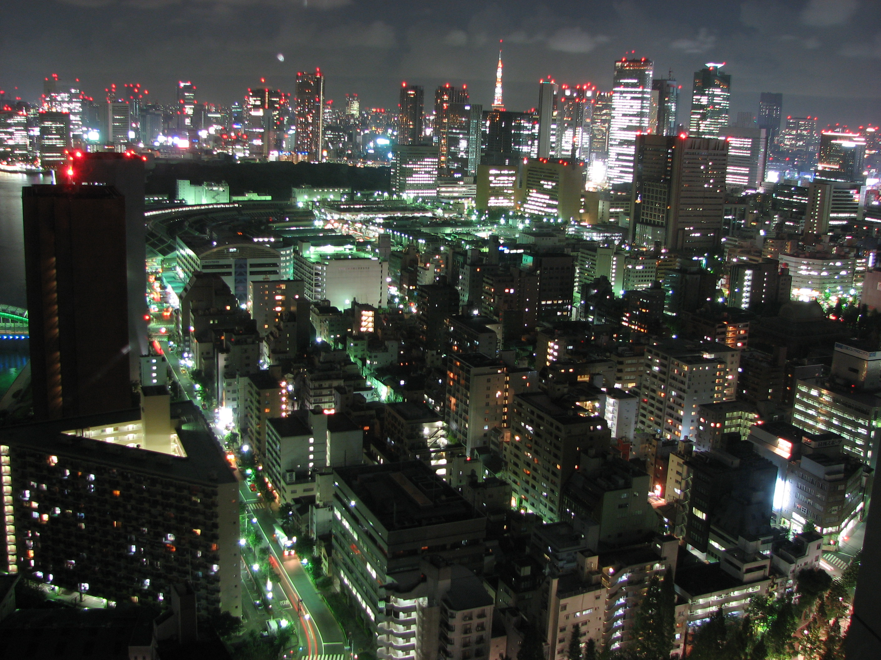 Tokyo at night